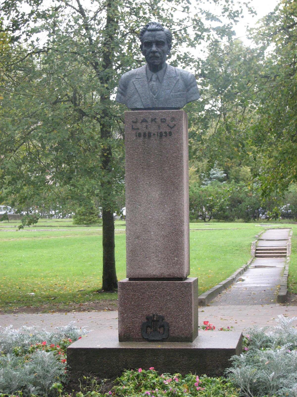 Statue of Estonian writer, Jakob Liiv, in Väike-Maarja, Estonia.